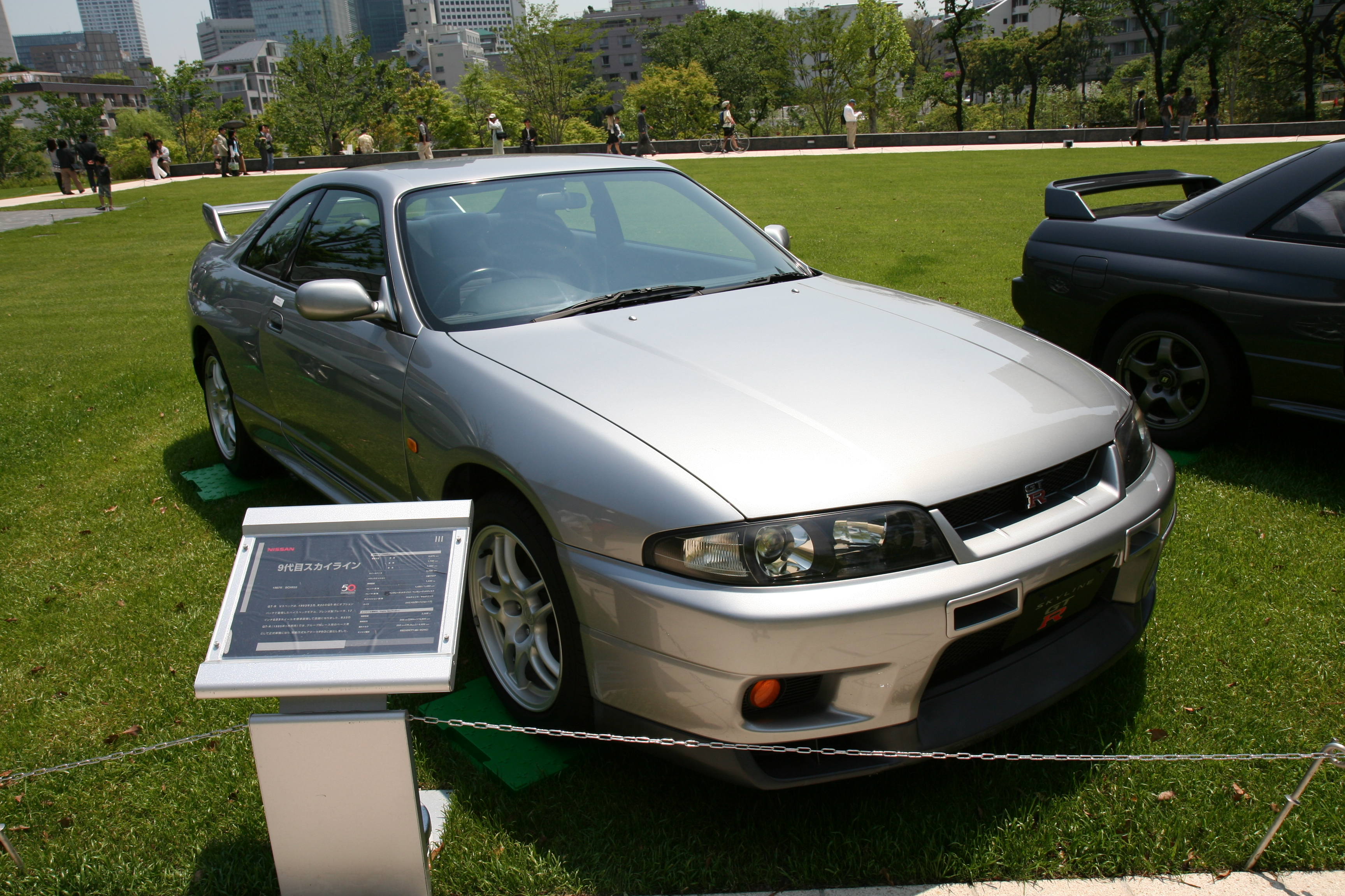 日産・スカイラインGTR 9代目(R33系)。